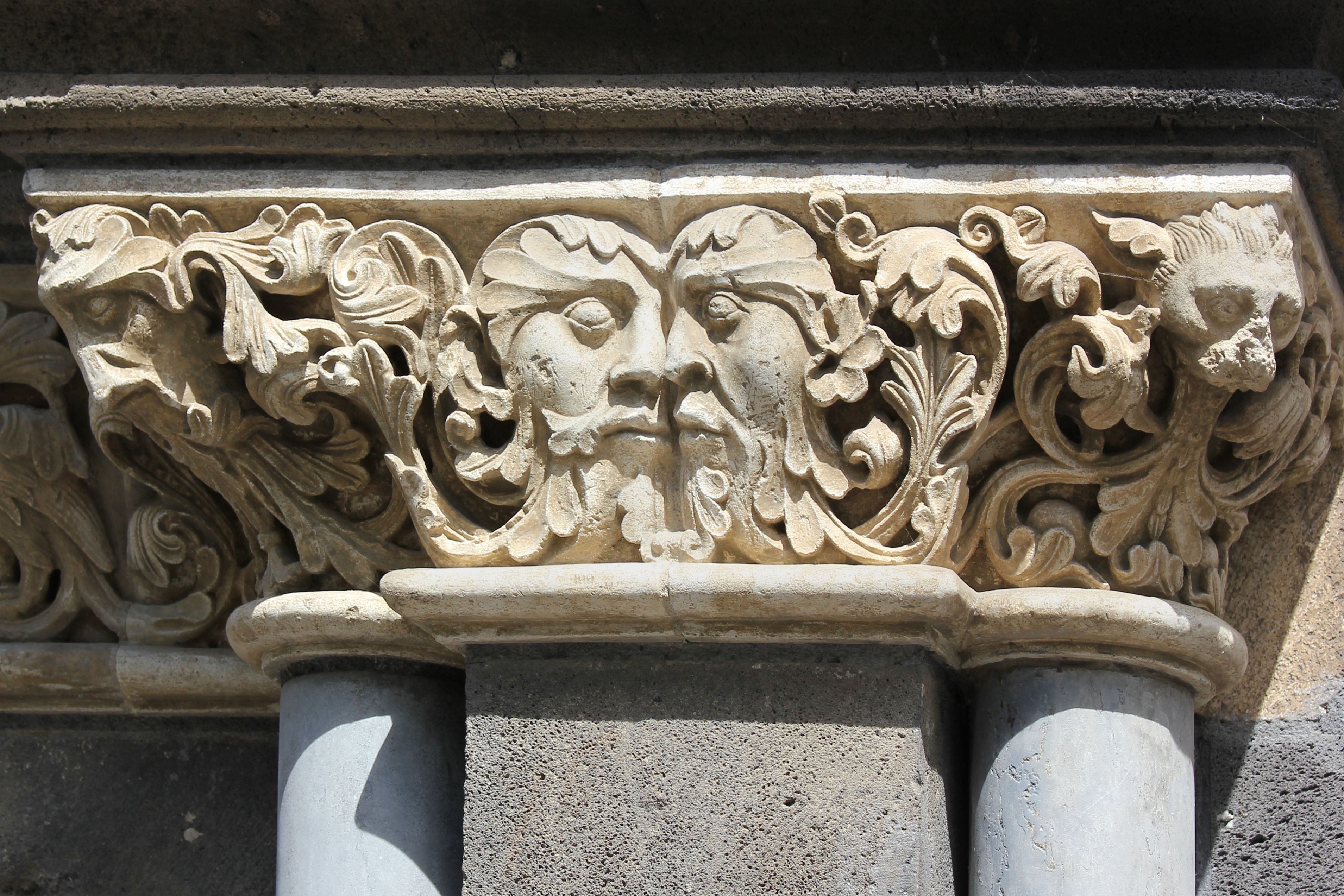 Abteikirche Maria Laach: Fries rechts an der Westseite der Vorhalle (um 1230), dem „Paradies“, sogenannte Grüne Männer oder Laubköpfe